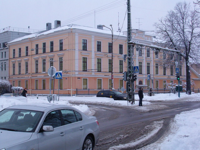 Kaitsepolitsei hoone. Tallinn, Toompuiestee 3.